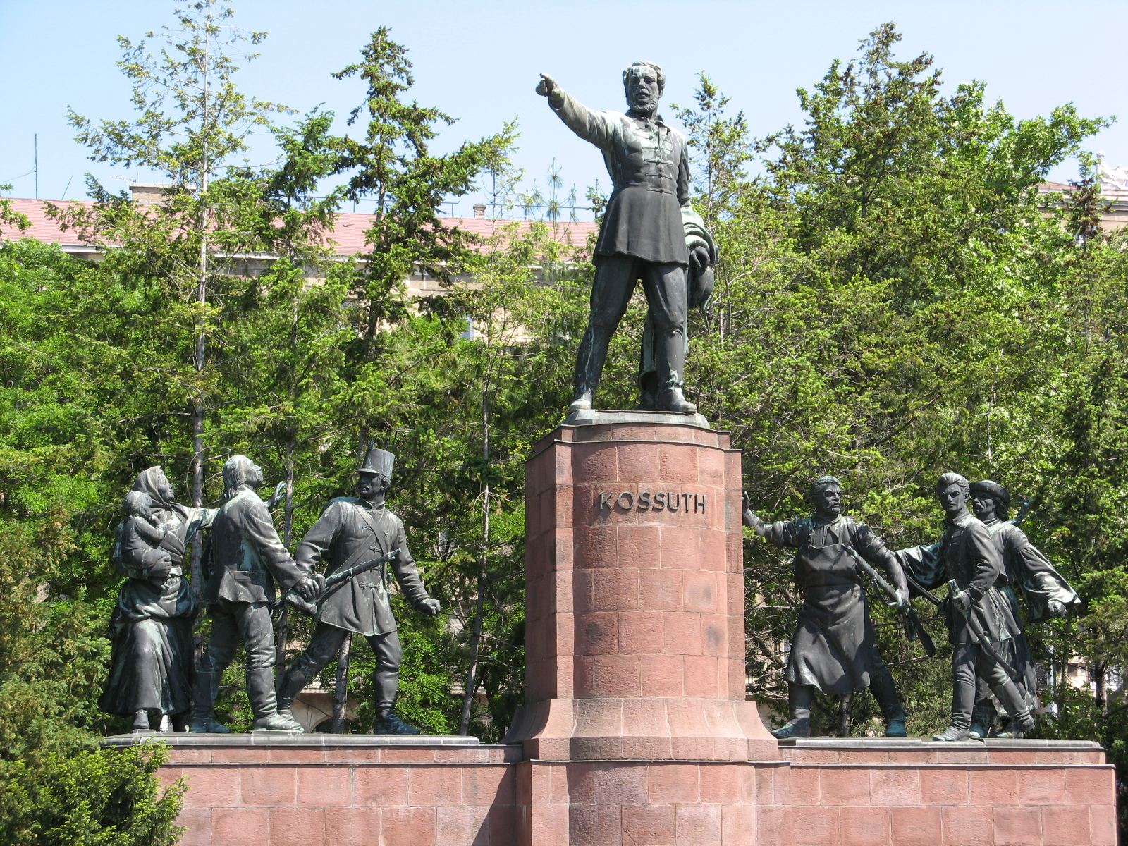 Monument à Kossuth